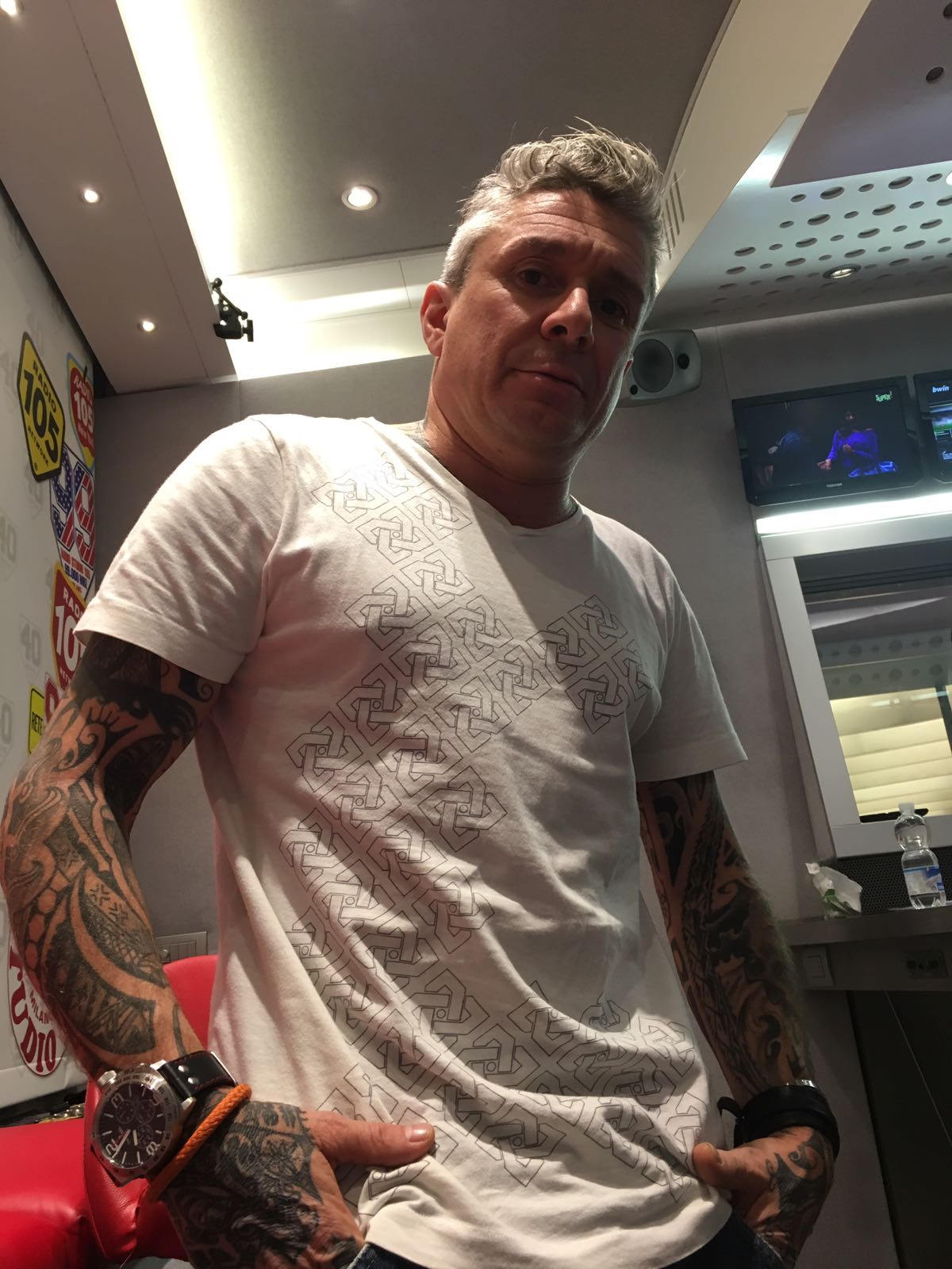 Martin klein conduttore radiofonico di radio 105